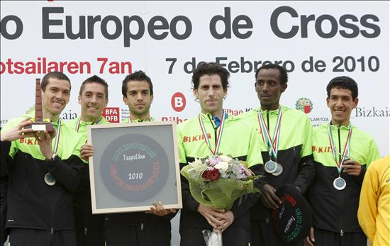 Campeonato de Europa de Cross 2010